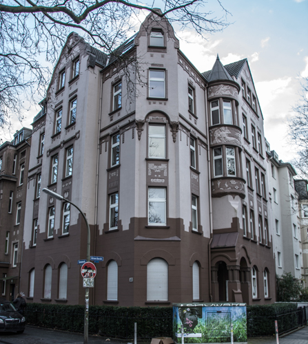 Wohnhaus von Minna u. Julius Falk